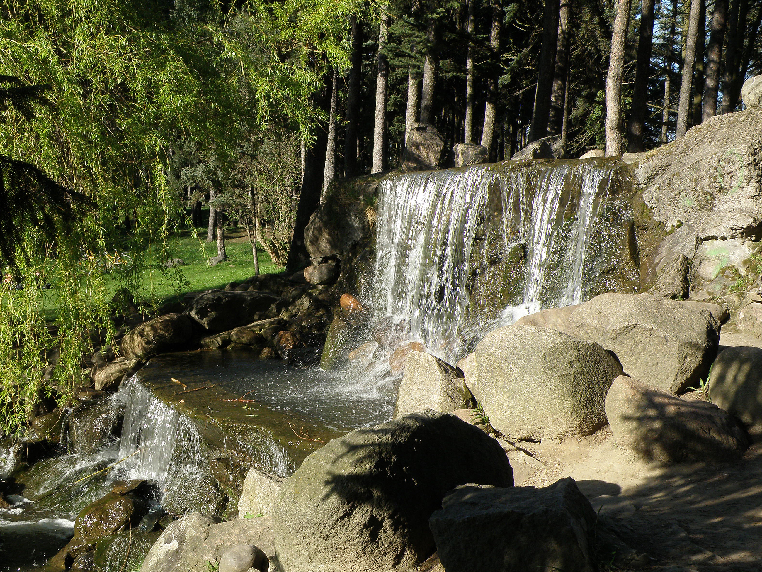 Warszawa, Park Skaryszewski - wodospad